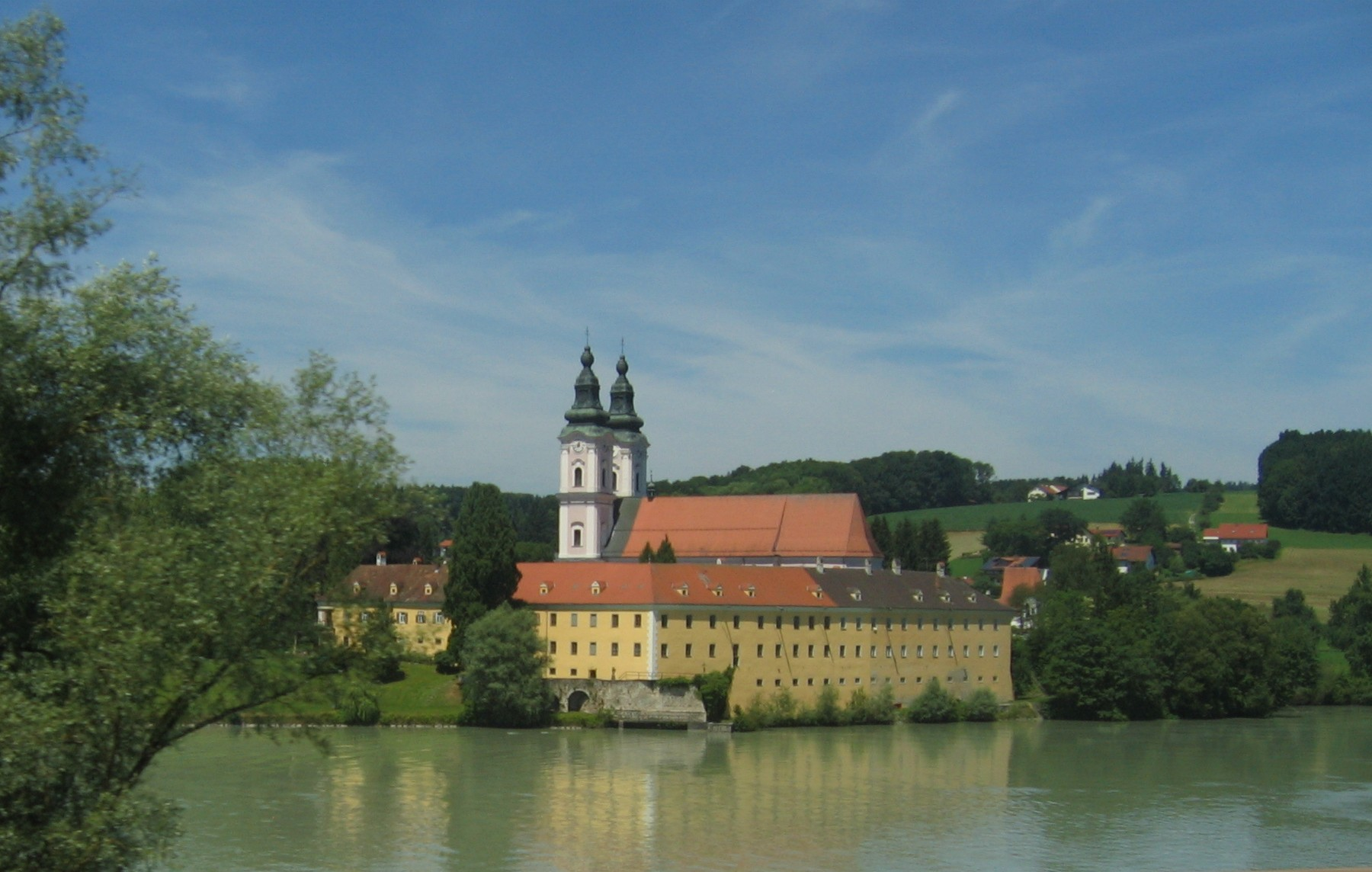 Kloster Vornbach am Inn, vom österreichischen Ufer aus gesehen.